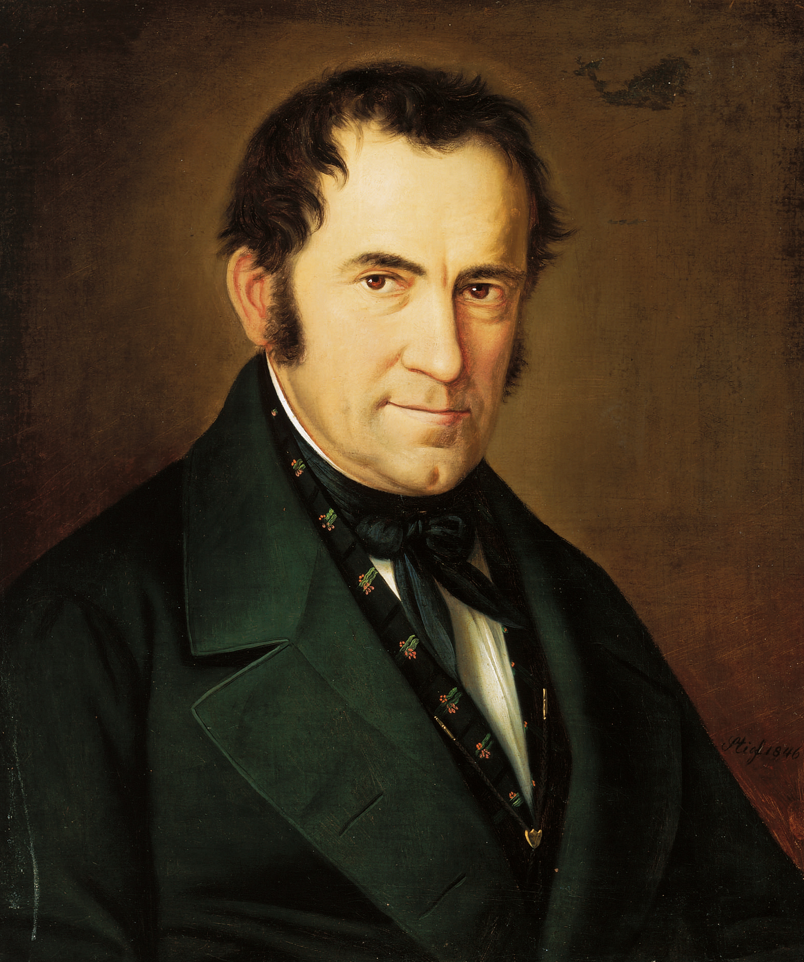 Gruber komponierte das Weihnachtslied „Stille Nacht, heilige Nacht“.